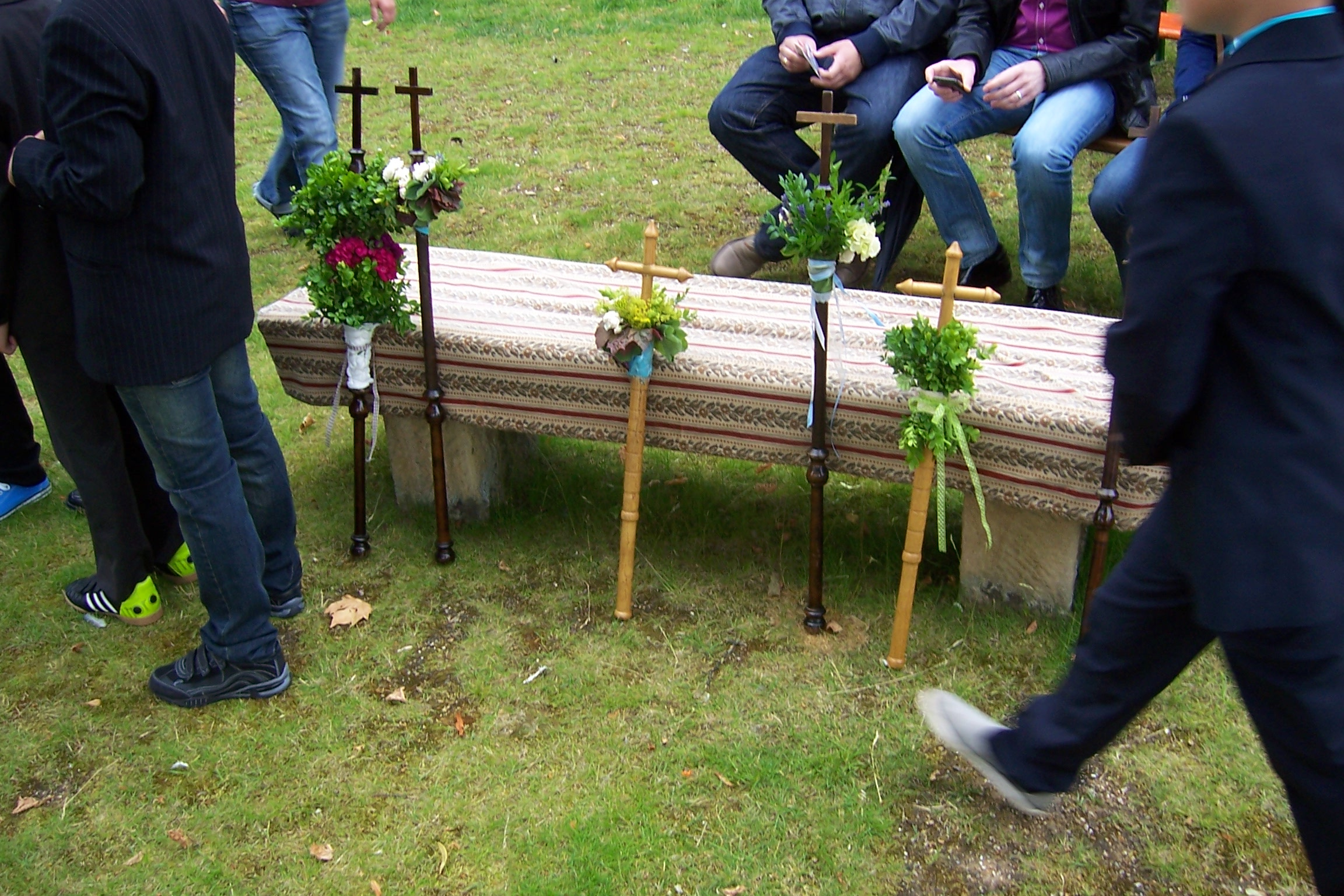 Torsten in Schöppingen, Kreis Borken (Altkreis Ahaus), NRW, Germany.